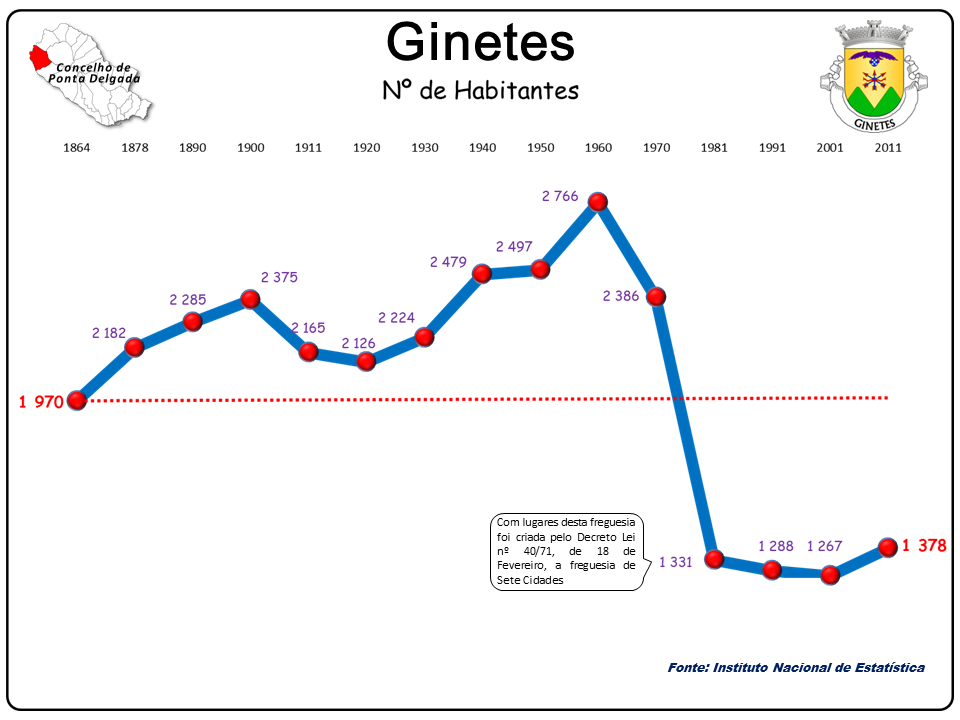 População